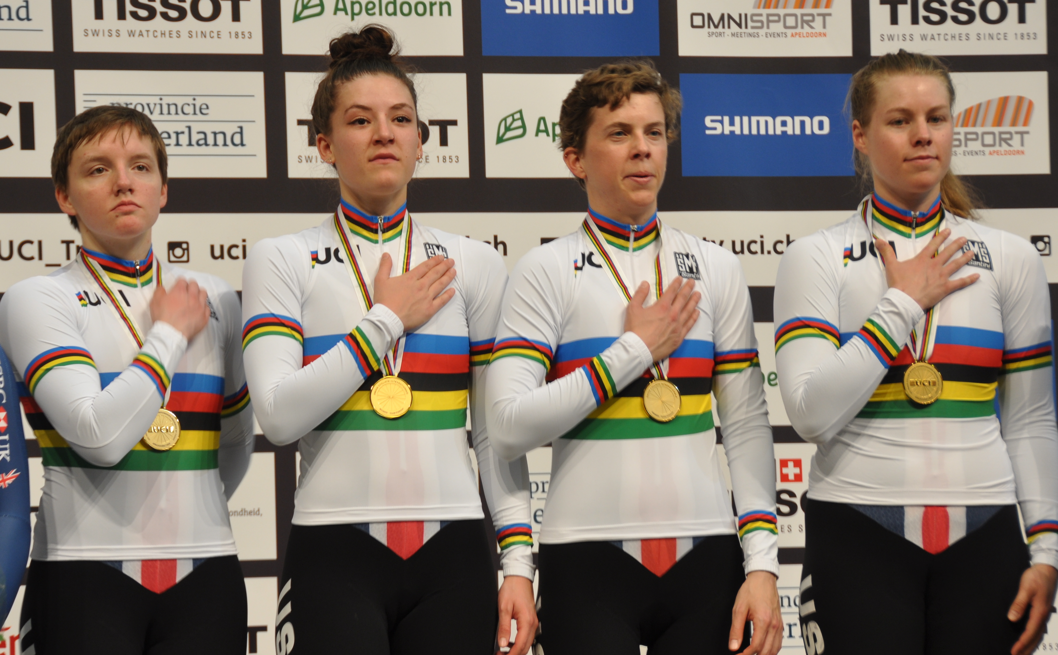 US-Frauen-Vierer, Weltmeisterinnen in der Mannschaftsverfolgung (v.l.n.r.): Kelly Catlin, Chloé Dygert, Kimberley Geist, Jennifer Valente